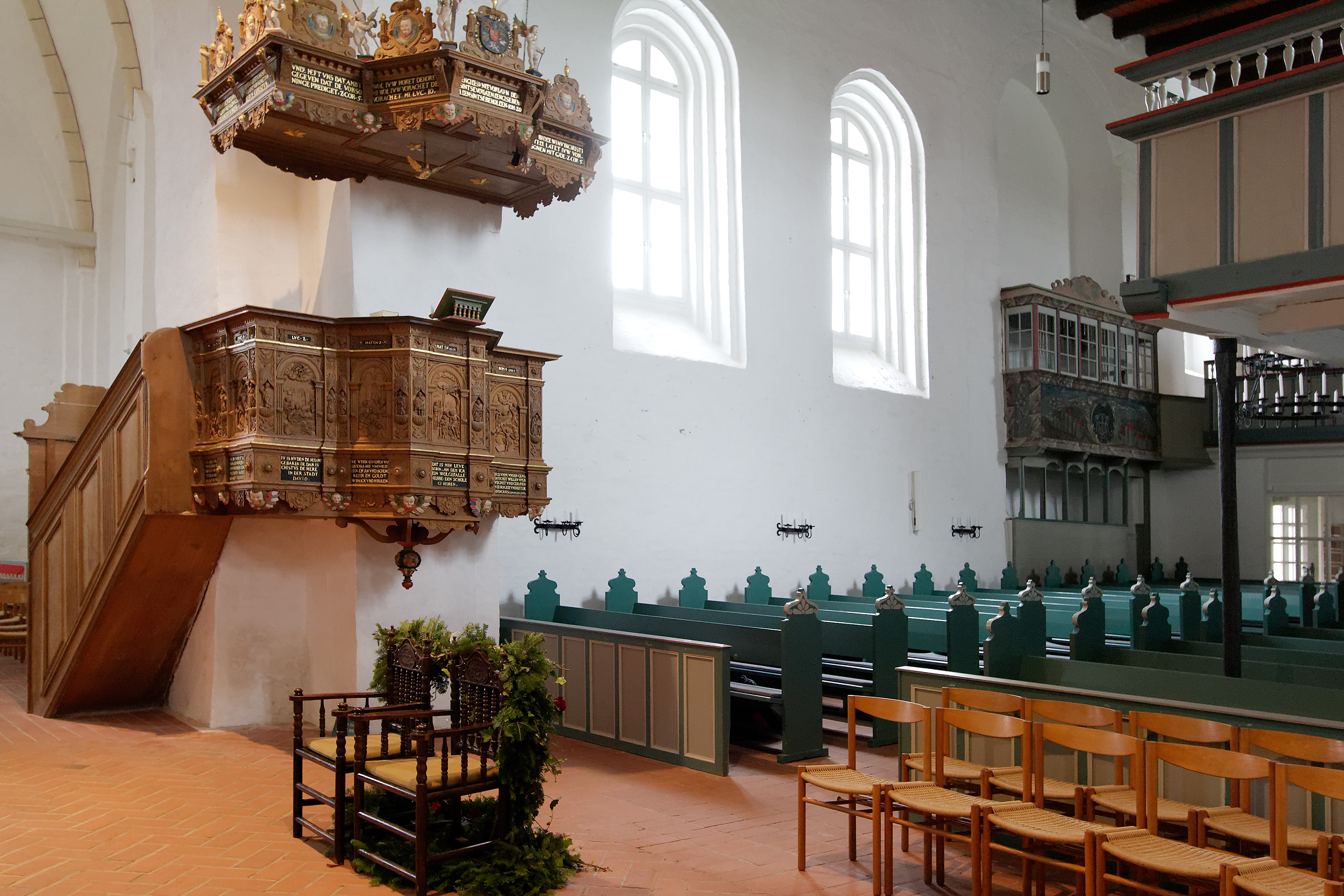 Kirche St. Johannis in Nieblum, Insel Föhr: Blick vom nördlichen Querschiff zur Kanzel.